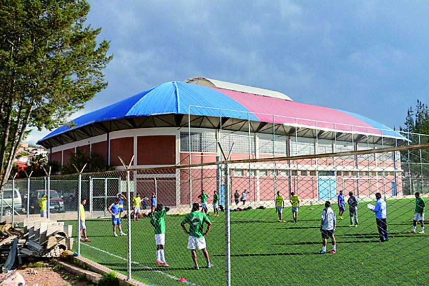 Coliseo N2 Universitario